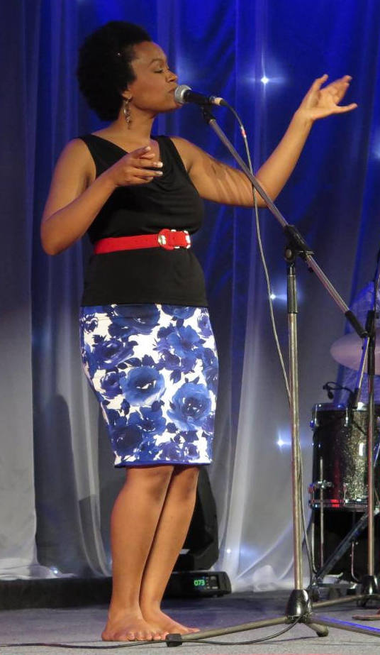 Meklit Hadero and Susie Ibarra